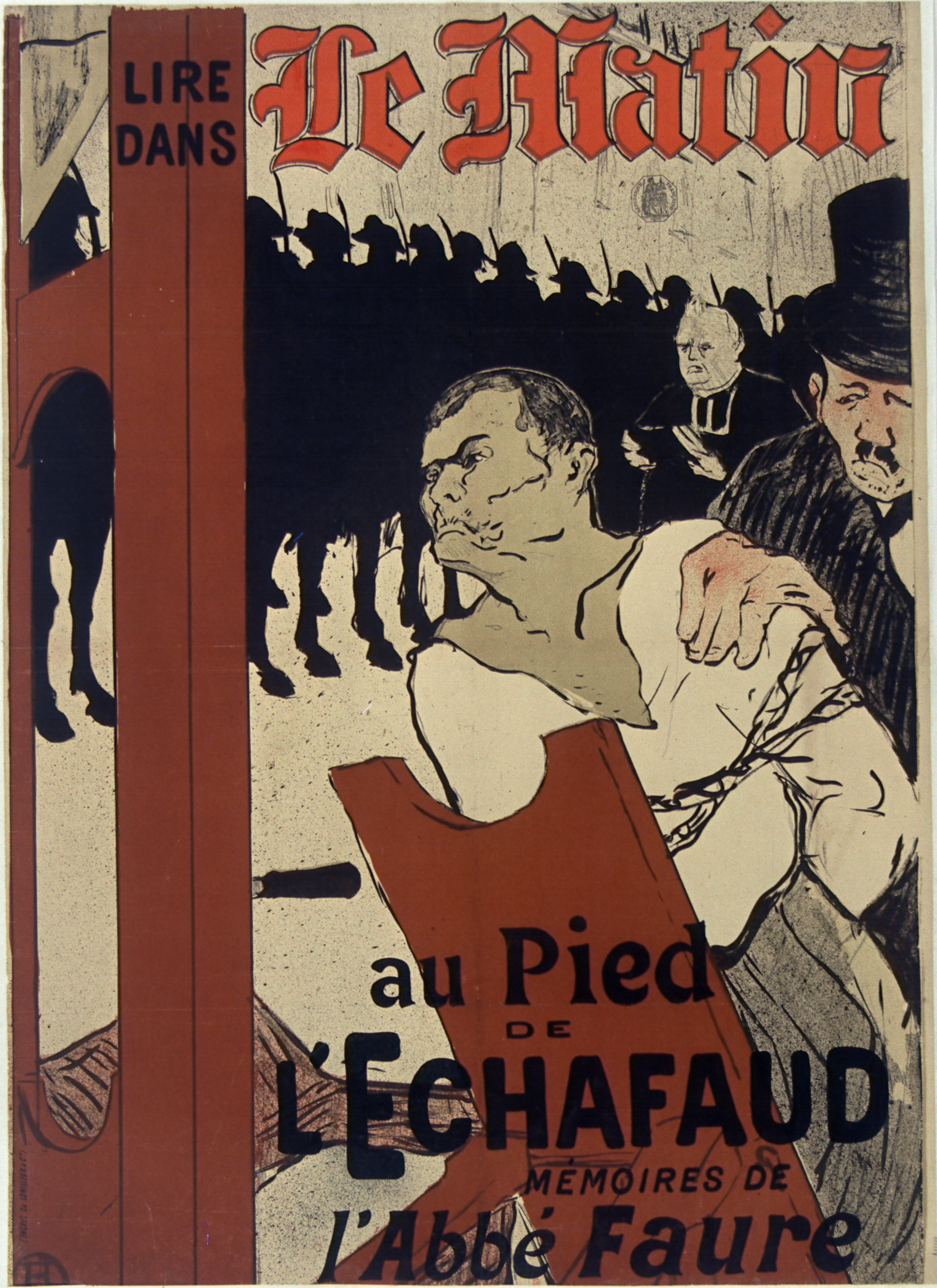 Affiche pour Le Matin : récit de l'abbé faure (Au pied de l'échafaud)